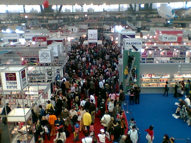 52nd Belgrade Book Fair.